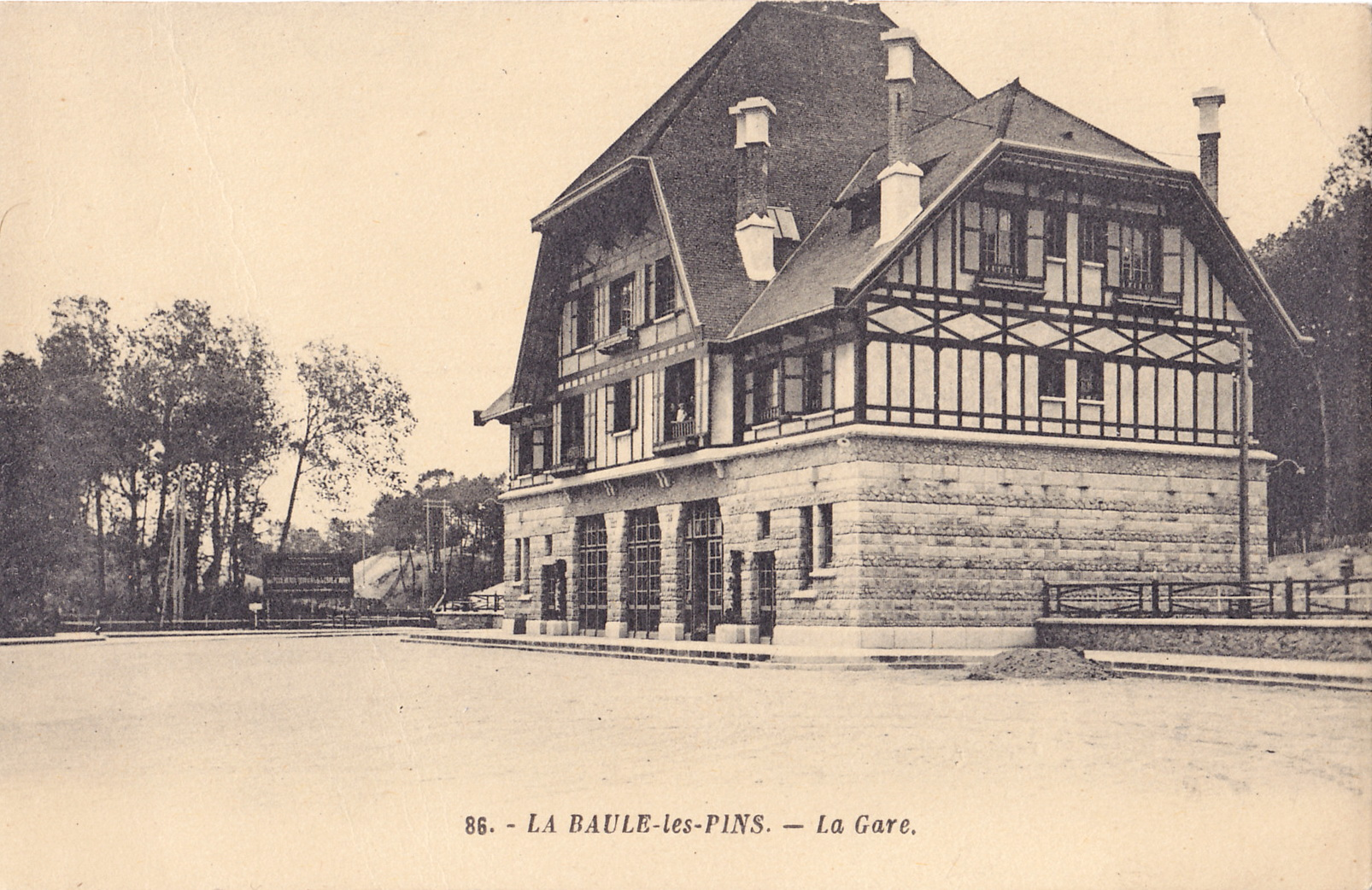 Carte postale ancienne éditée par Artaud, n°86 : LA BAULE-LES-PINS - La Gare